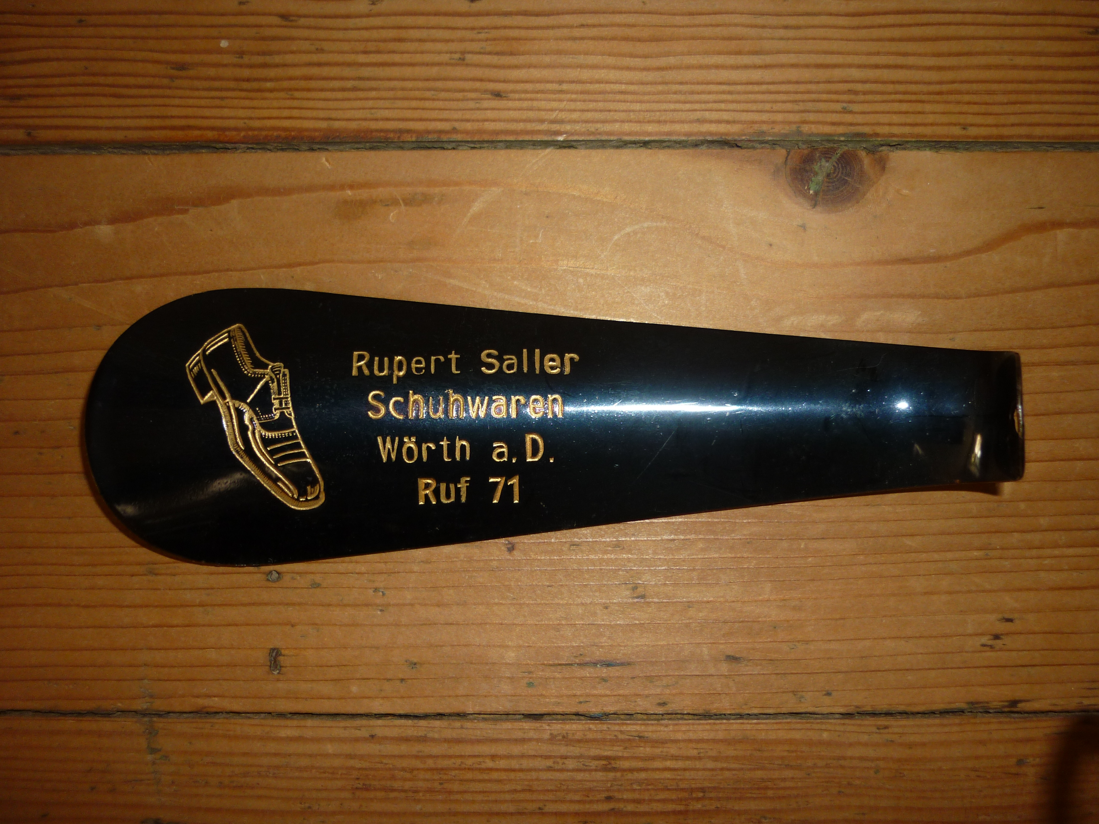 Werbeschuhlöffel 1950er Jahre Wörth Donau